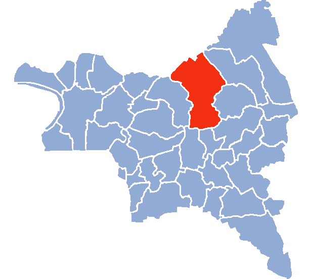 Auteur Hervé SUAUDEAU Licensing Catégorie:Cartes de Seine-saint-Denis Catégorie:Image de Aulnay-sous-Bois